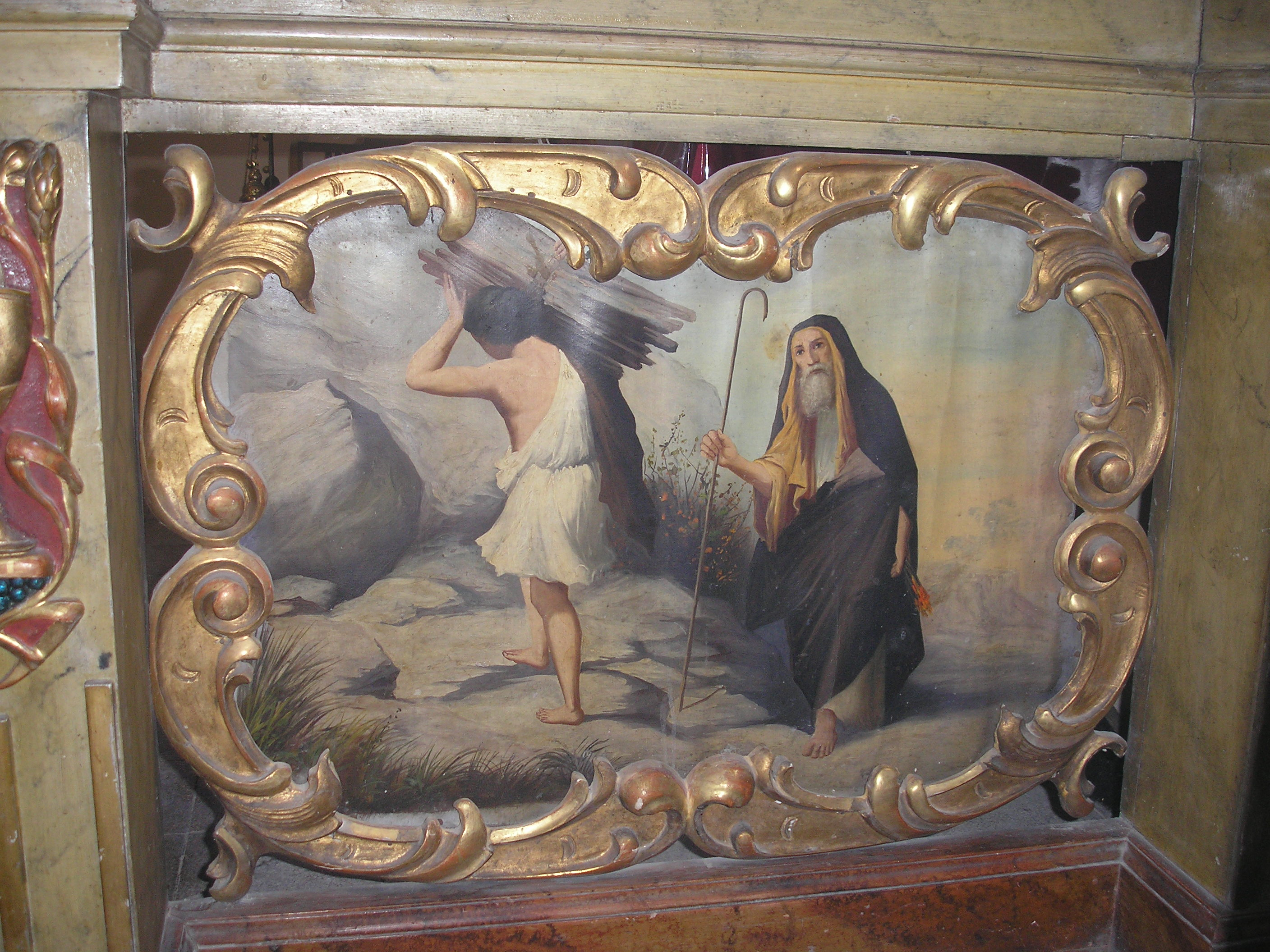 Ábrahám áldozata (Szerb ortodox templom, Szeged-Szőreg, Magyarország)